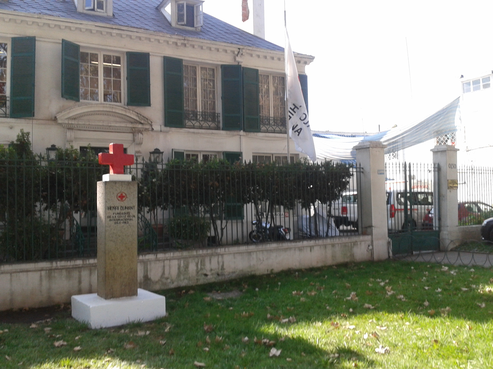 Sede de la Cruz Roja Chilena, Providencia, Santiago.